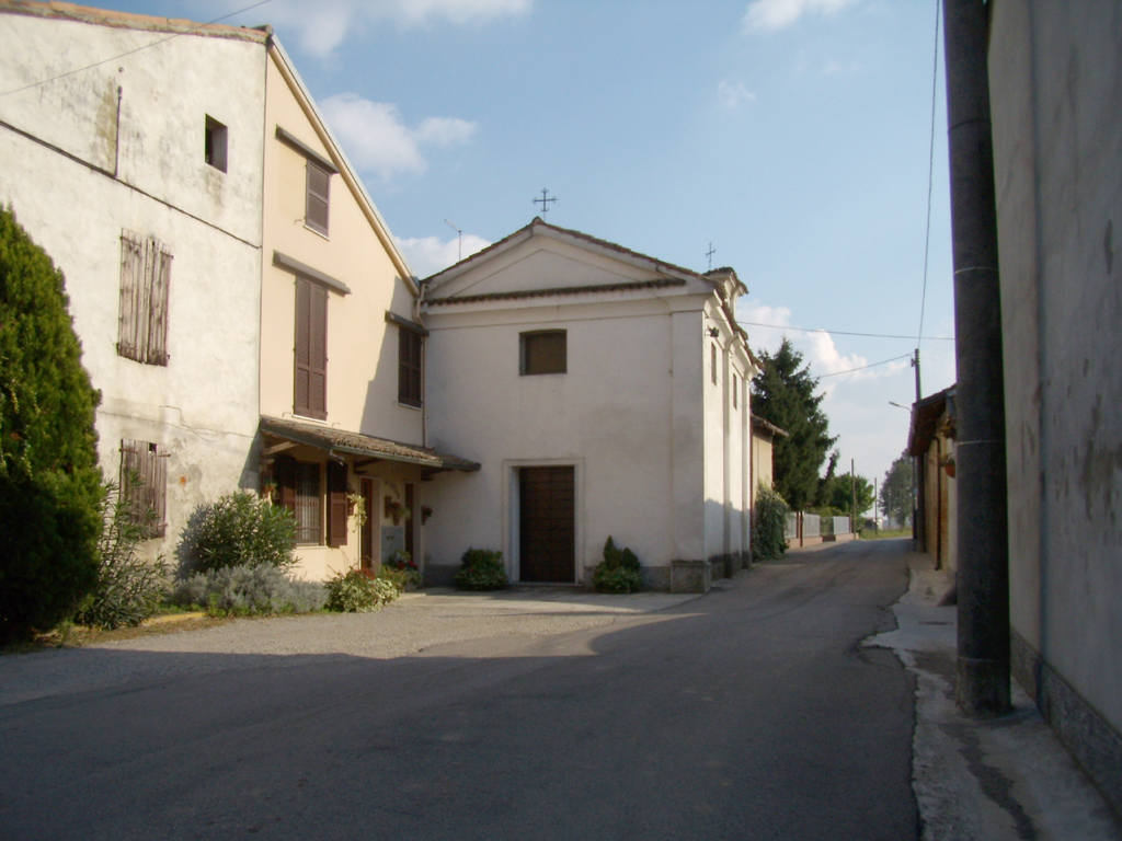 La chiesina di Ca’ de’ Bolli, località nel comune di San Martino in Strada.